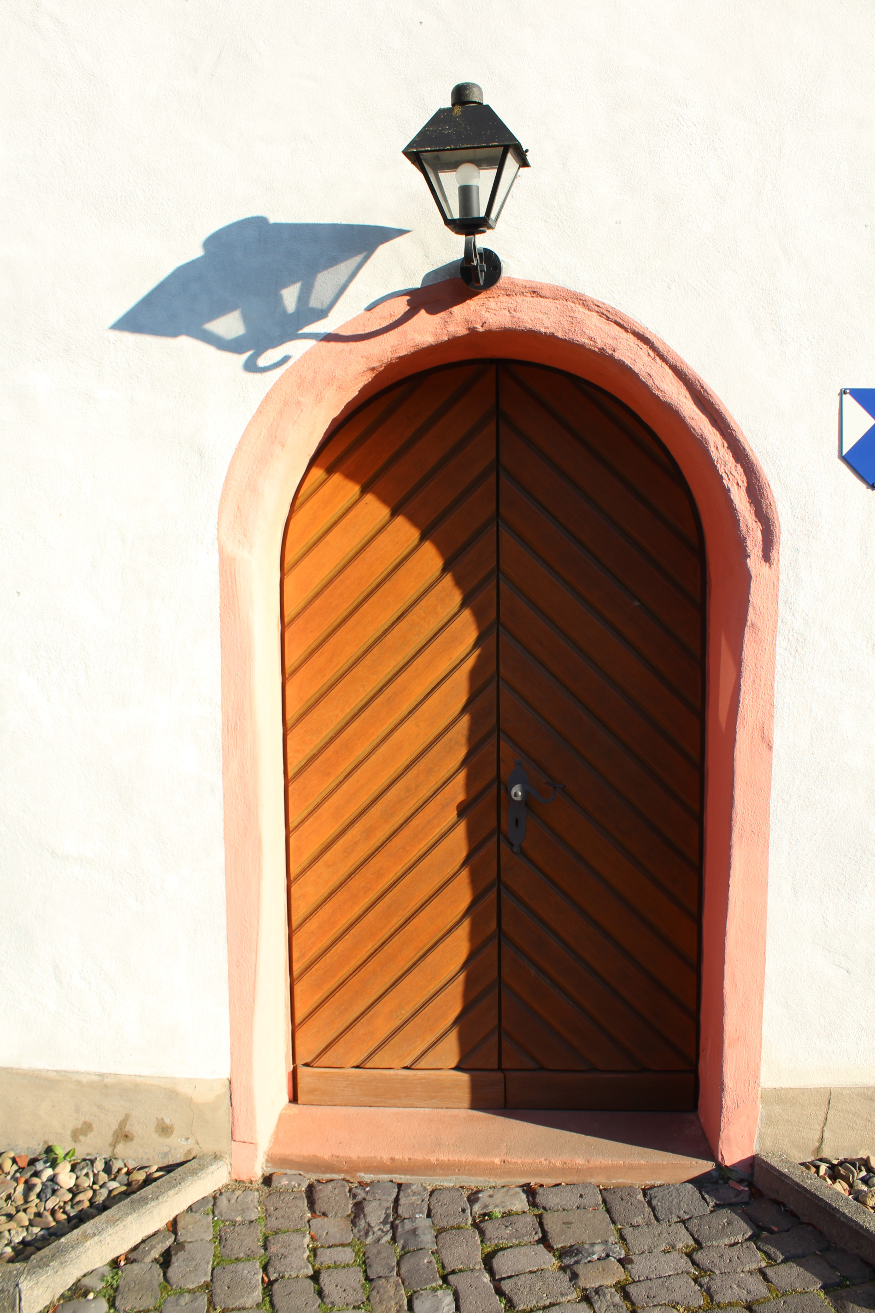 Evangelische Kirche Steindorf, Wetzlar, Lahn-Dill-Kreis, Hessen, Deutschland